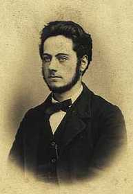 Herman Martin Trier (10.May.1845-01.Sep.1925), politiker, pædagog. Gift med Emma, f. Adler (1855-1912)